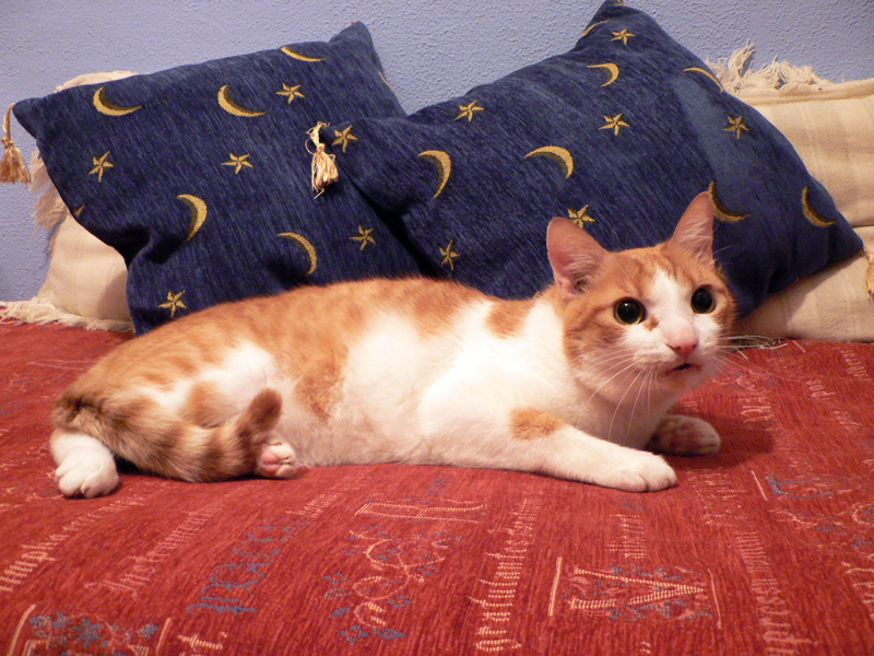 European cat